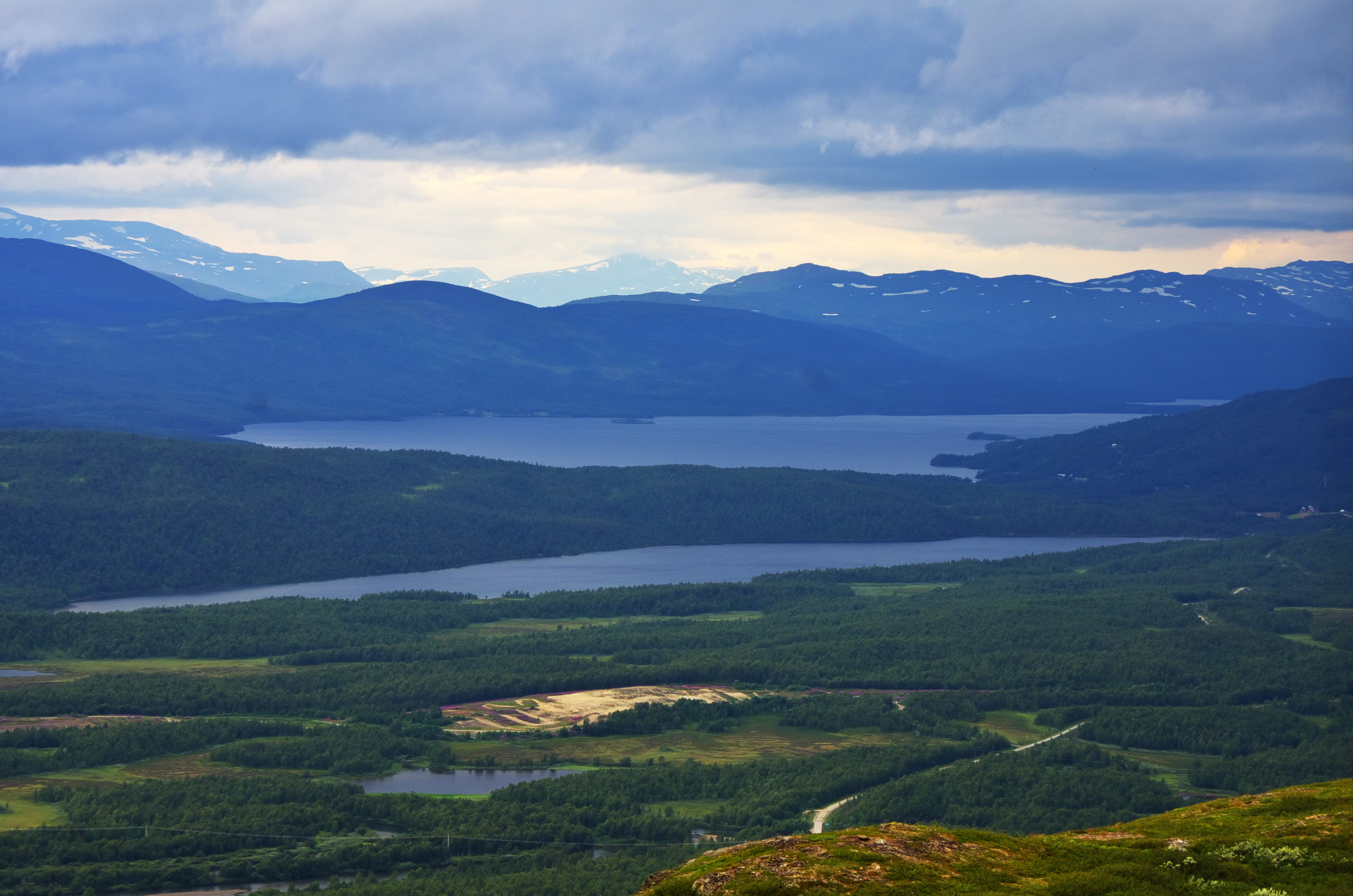 Sjöarna Tängvattnet (längst bort i bild) och Maisor (näst längst bort i bild) i Storumans kommun i Lappland. Sjöarna ligger omkring 5 km väster om Hemavan. Den lilla sjön närmast i bild är namnlös.